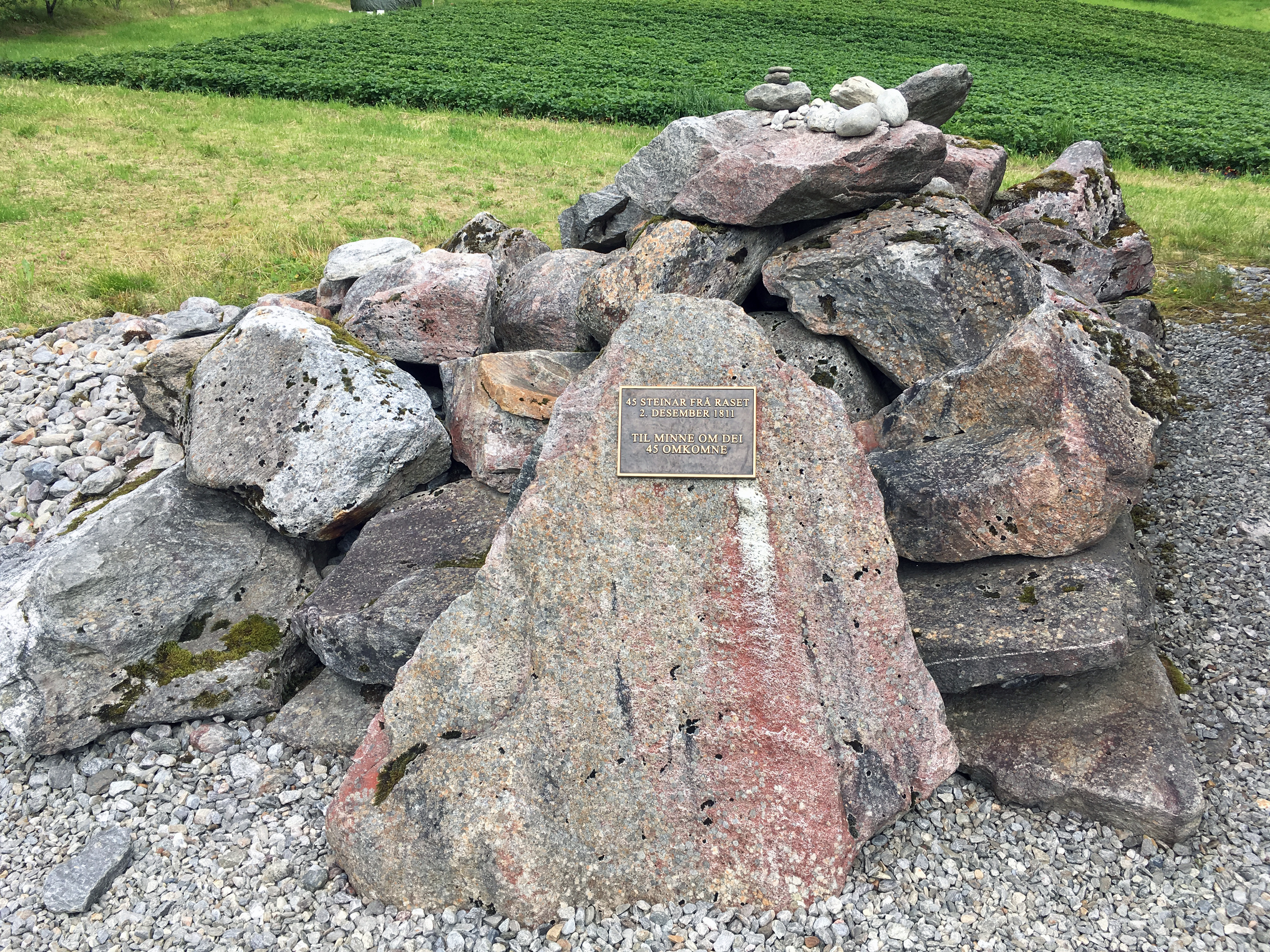 Monument (2008) til minne om dei 45 omkomne i raset på Nese i Arnafjord i Vik i Sogn og Fjordane, natt til 2. desember 1811. Minnesmerket er sett saman av 45 steinar frå raset – éin til kvar omkomen person.